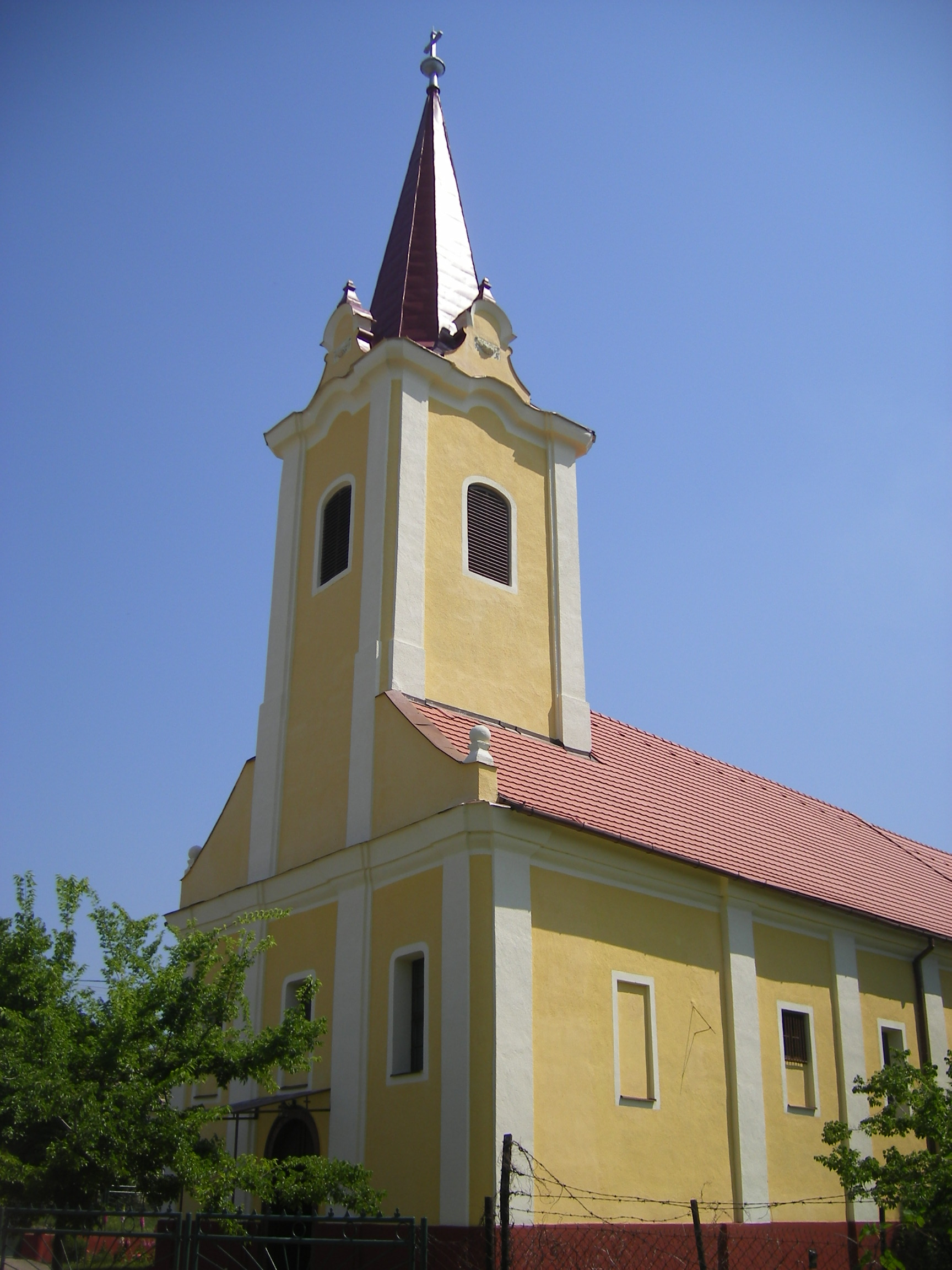 Szentpéter - katolikus templom